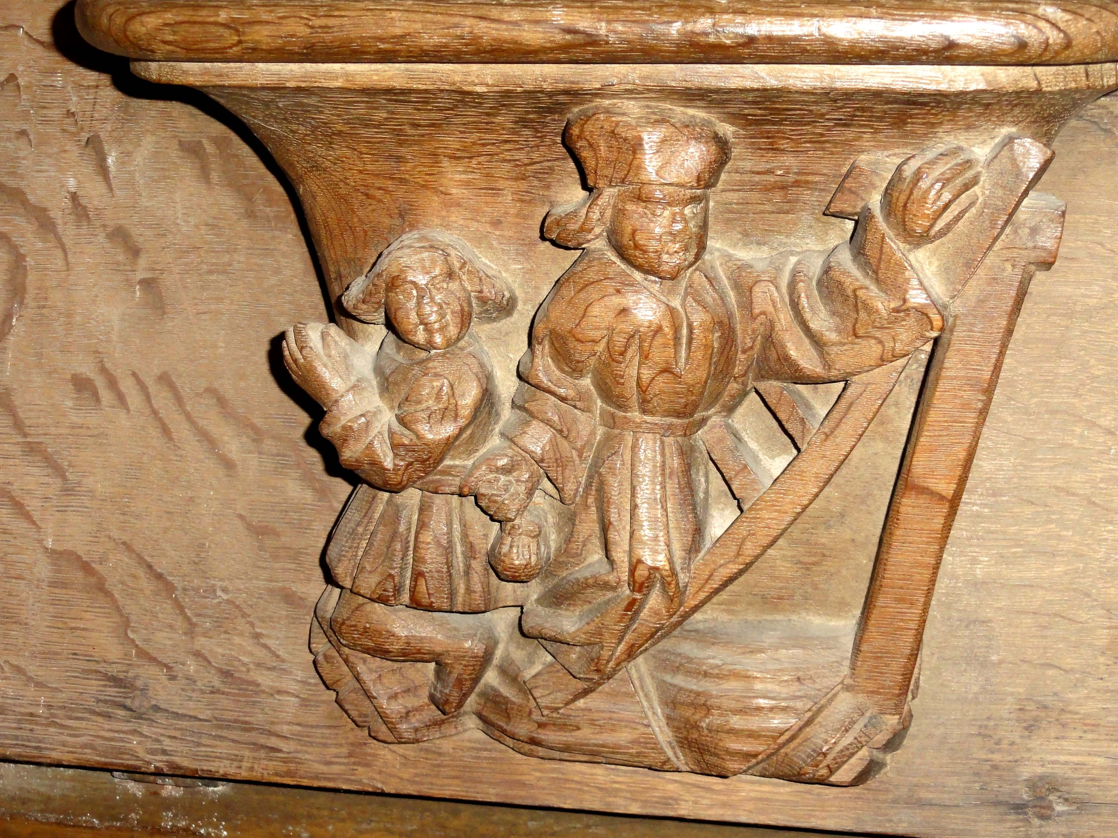 Miséricorde (voir titre) ; numérotation dans le sens des aiguilles de l'horloge en commençant par le 2e rang (n° 1 à 20), et en continuant par le 1er rang (n° 21 à 32).